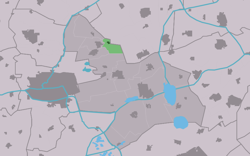 Kaartsje fan himrik fan Mûnein